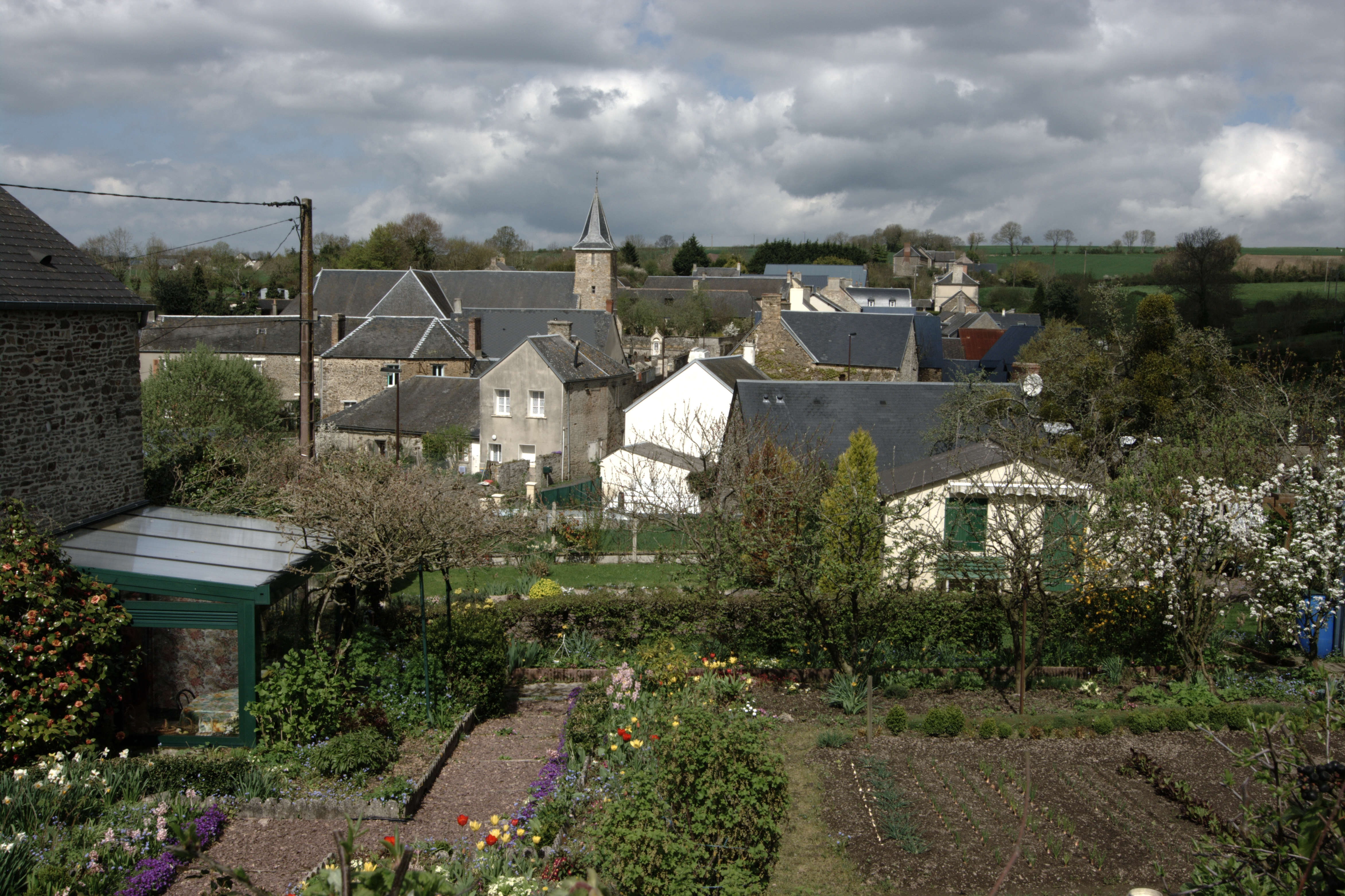 Une vue du village de Hamars, Calvados.